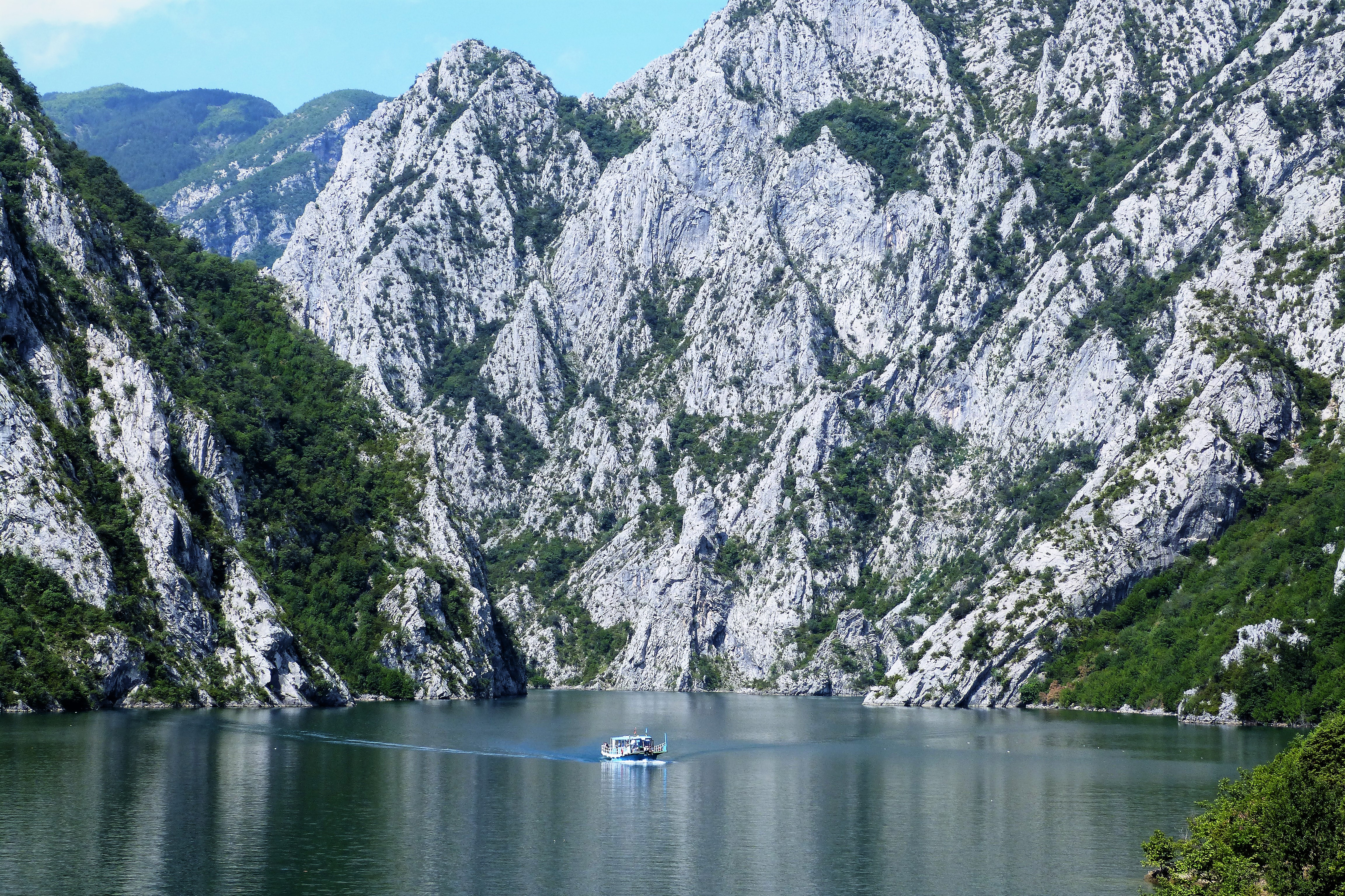 Koman Ferry, Albania